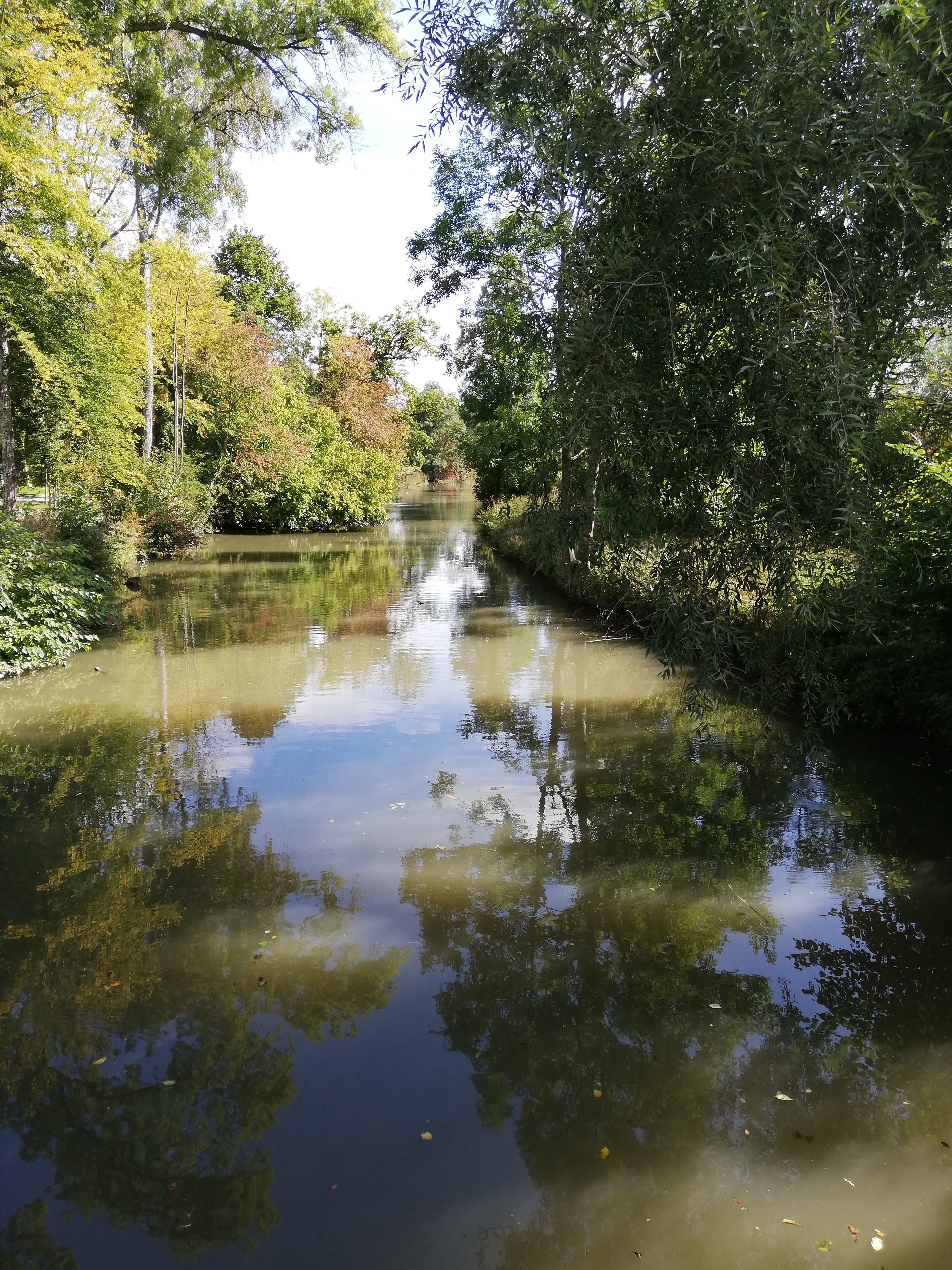 Große Vils in Taufkirchen nähe Rathaus